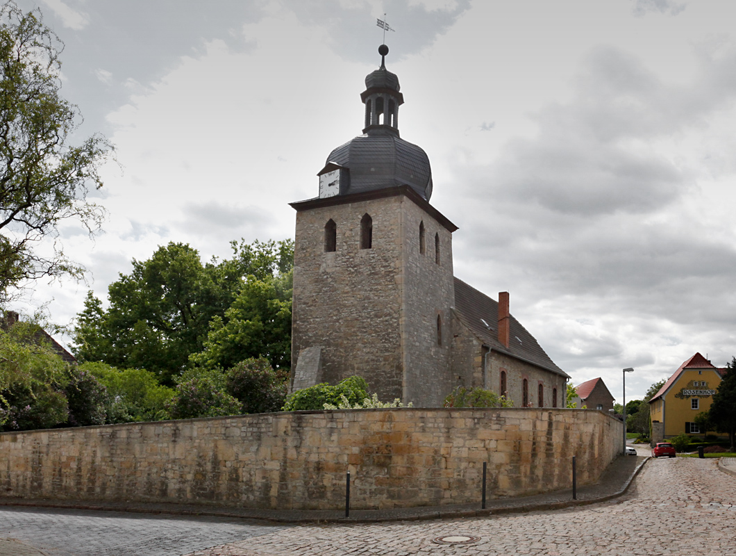 Die Dorfkirche Schmirma, Ansicht von Nordosten